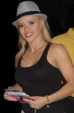 Doda podczas koncertu charytatywnego w Czeladzi w 2010 roku.